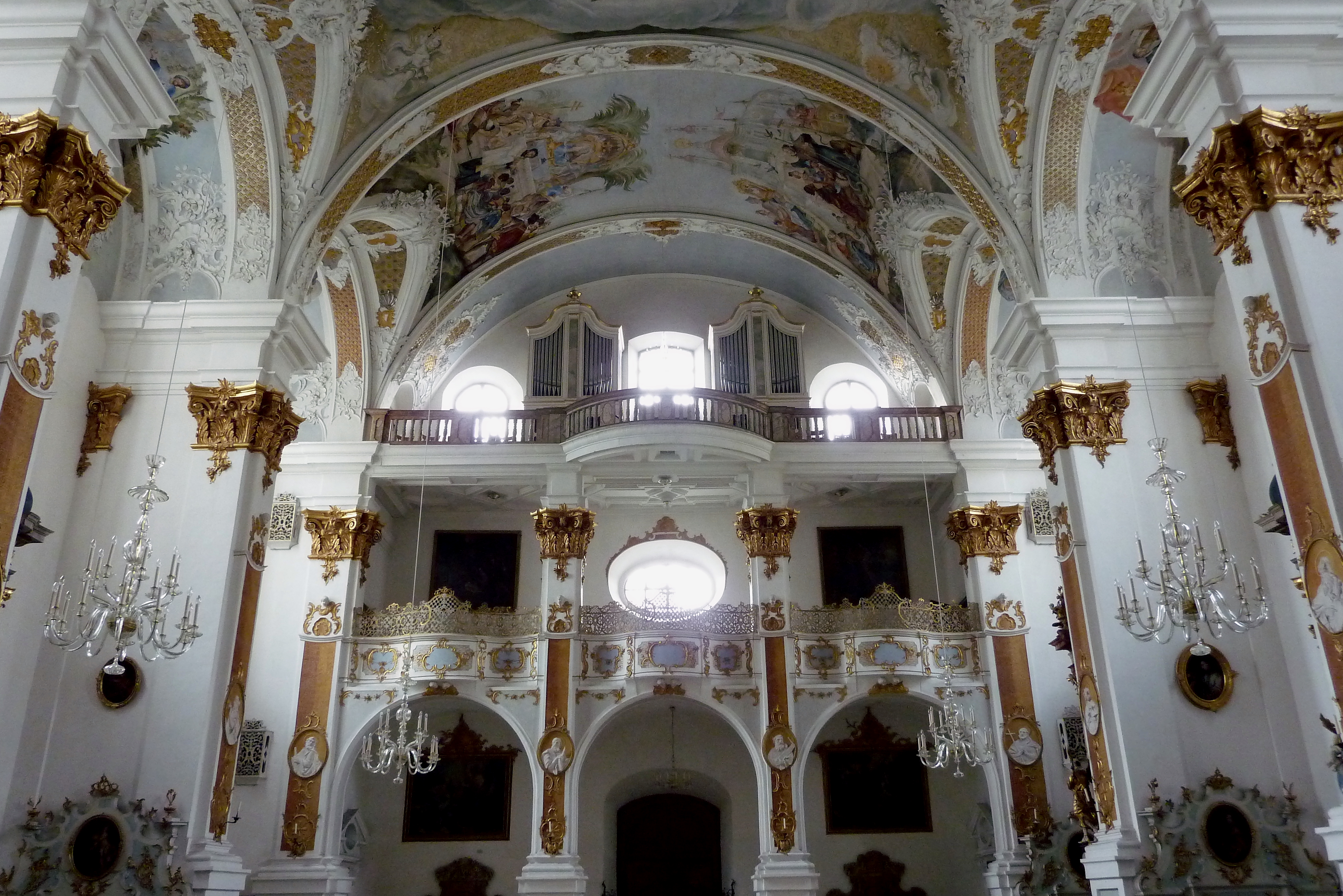 Studienkirche Mariä Himmelfahrt in Dillingen an der Donau, Innenraum mit Blick zur Westempore